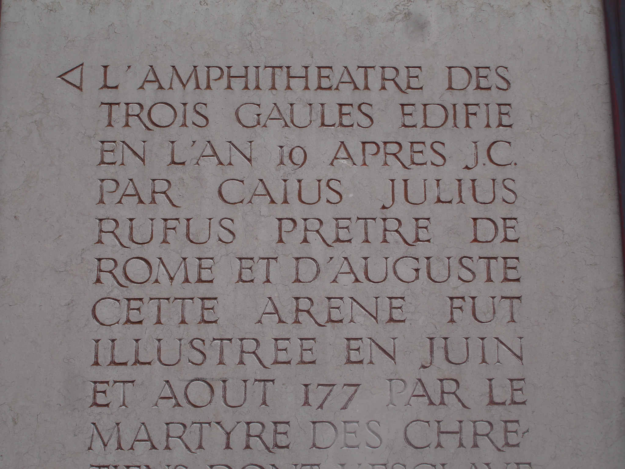 Lyon amphithéâtre des 3 gaules : stèle informative